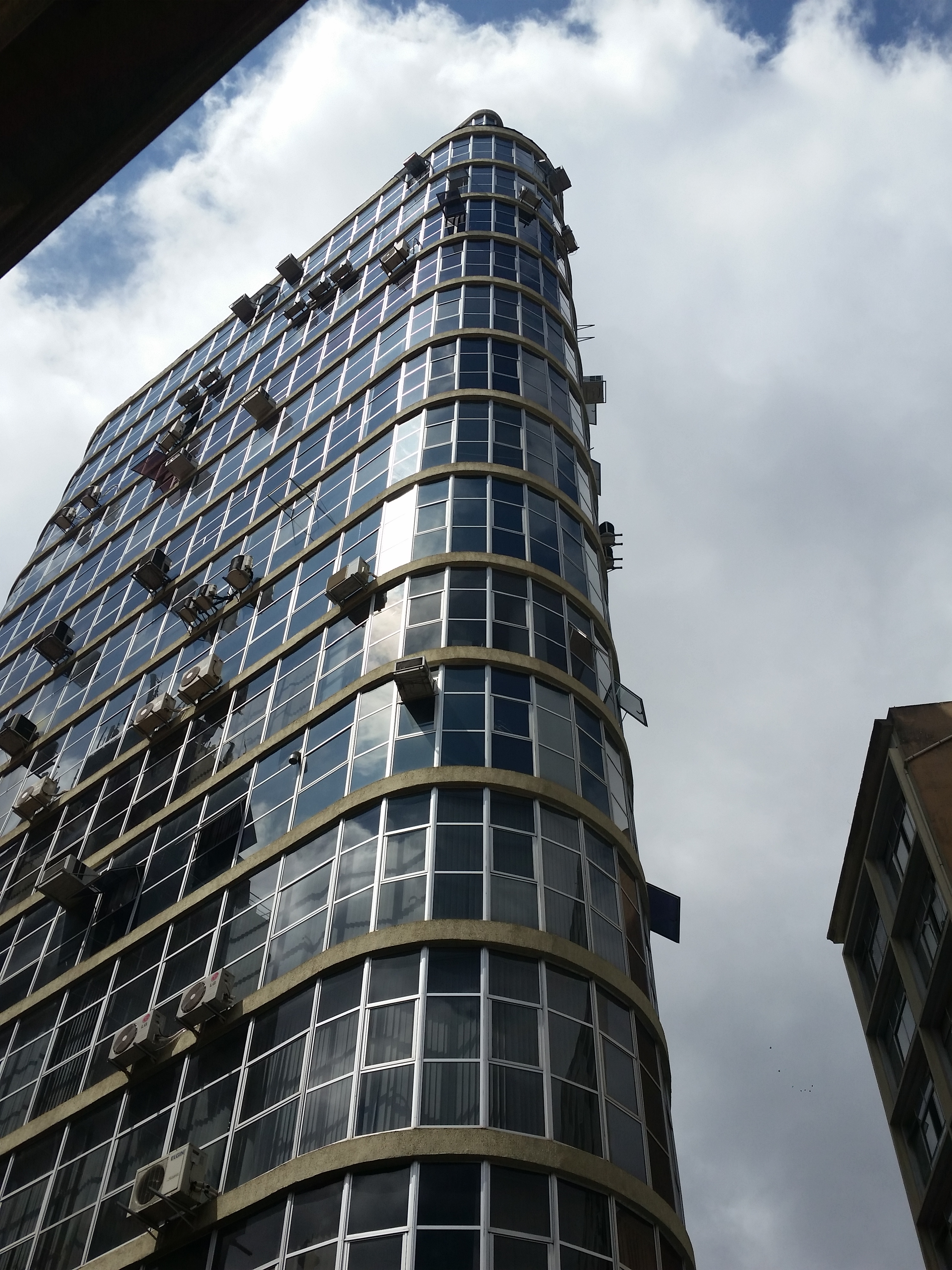 Ponta oeste do Edifício Triângulo, em São Paulo (SP), Brasil